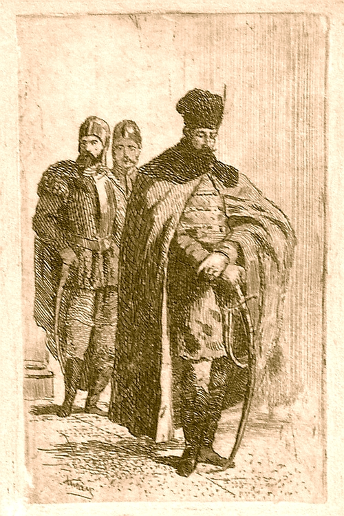 Mihai Viteazul, semnat stânga jos în lucrare, acvaforte şi acuarelă, 8.8x5.5cm, [1874], lucrarea figurează în catalogul Th.Aman - gravor de Mariana Vida/1993, cat.98 şi reprodusă